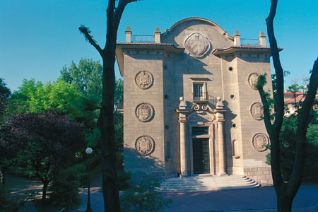 Fondation Rosa Abreu De Grancher Cite internationale universitaire de Paris